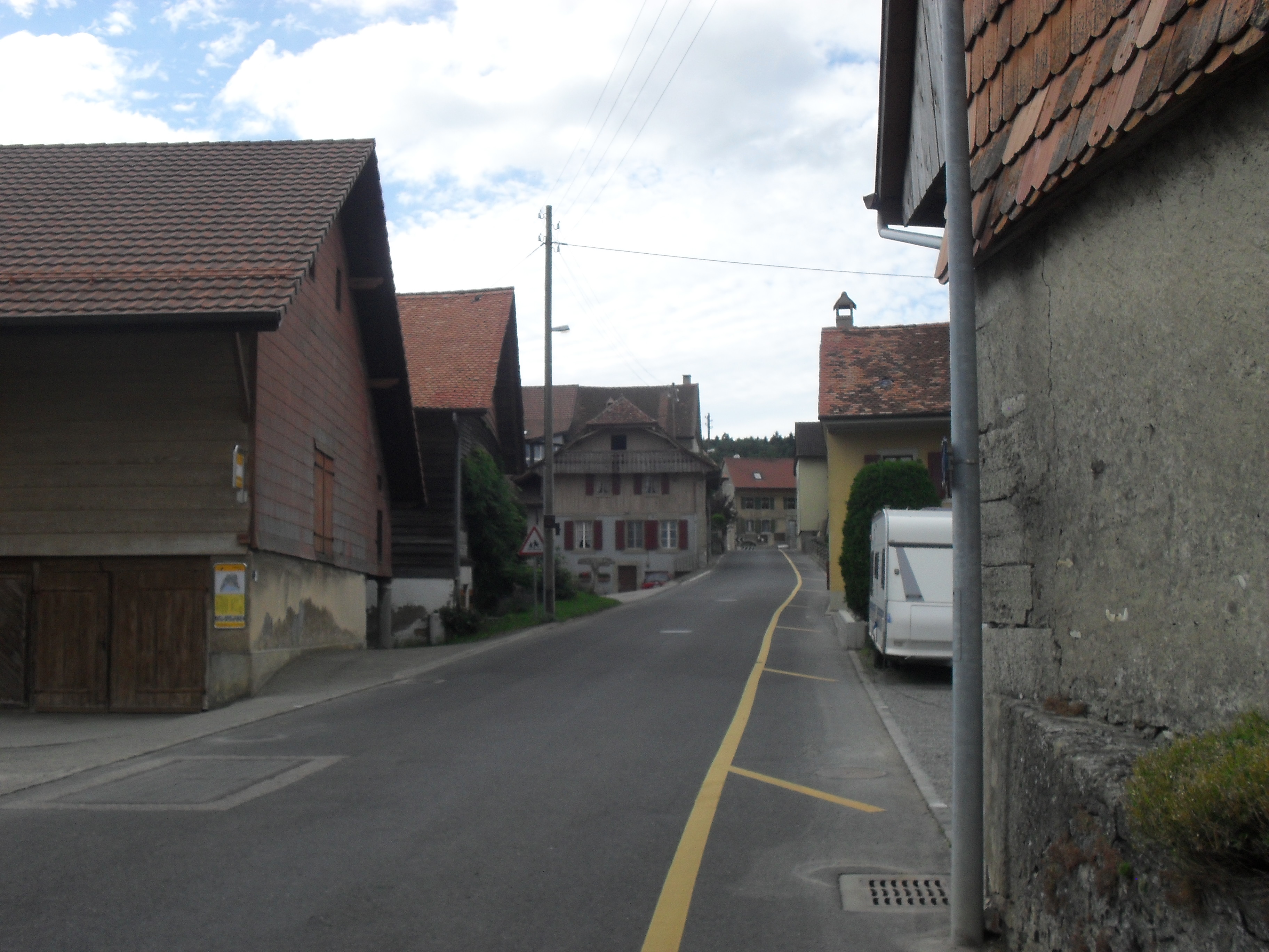 Vue de Sassel